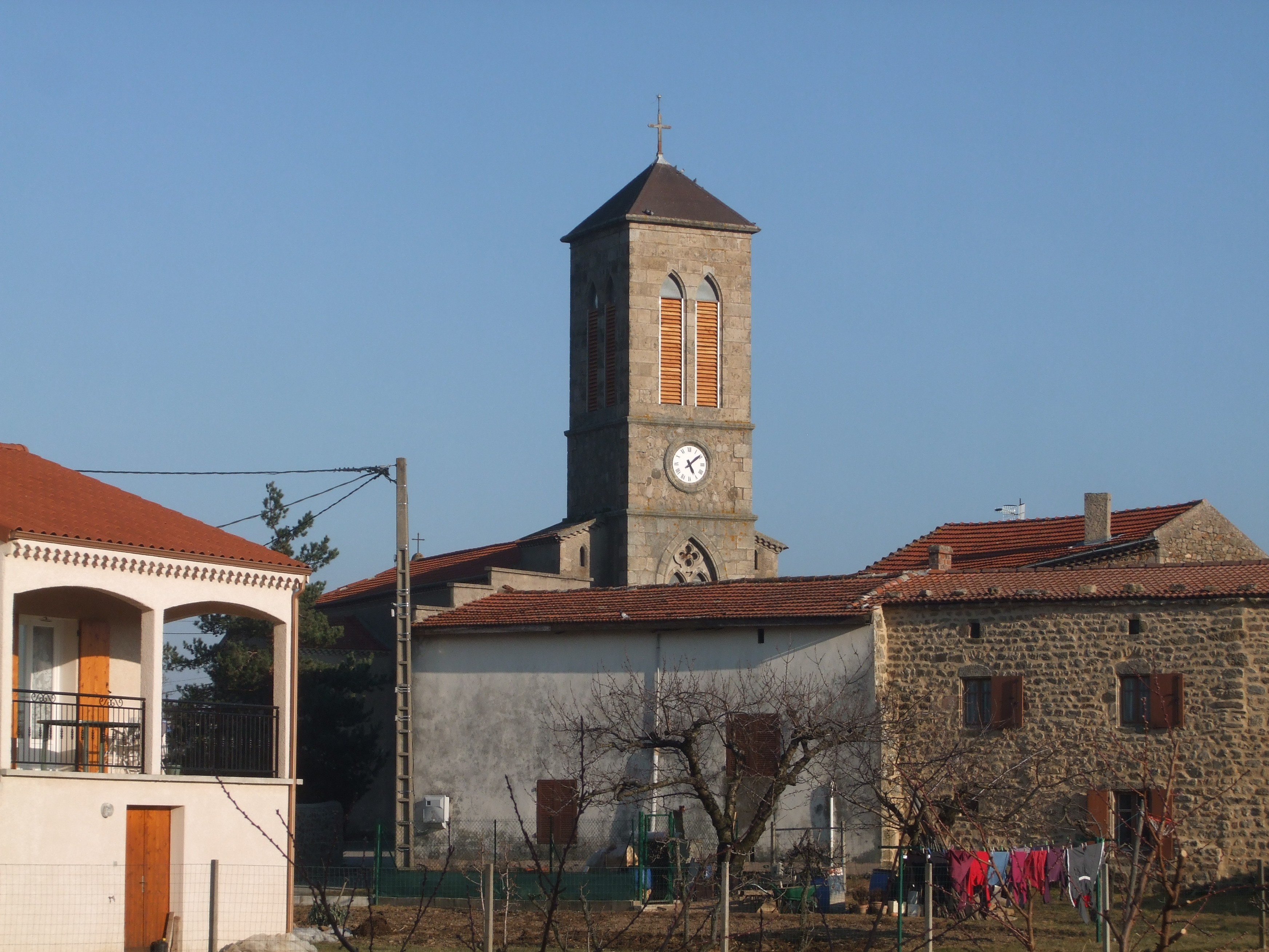 église de Deyras